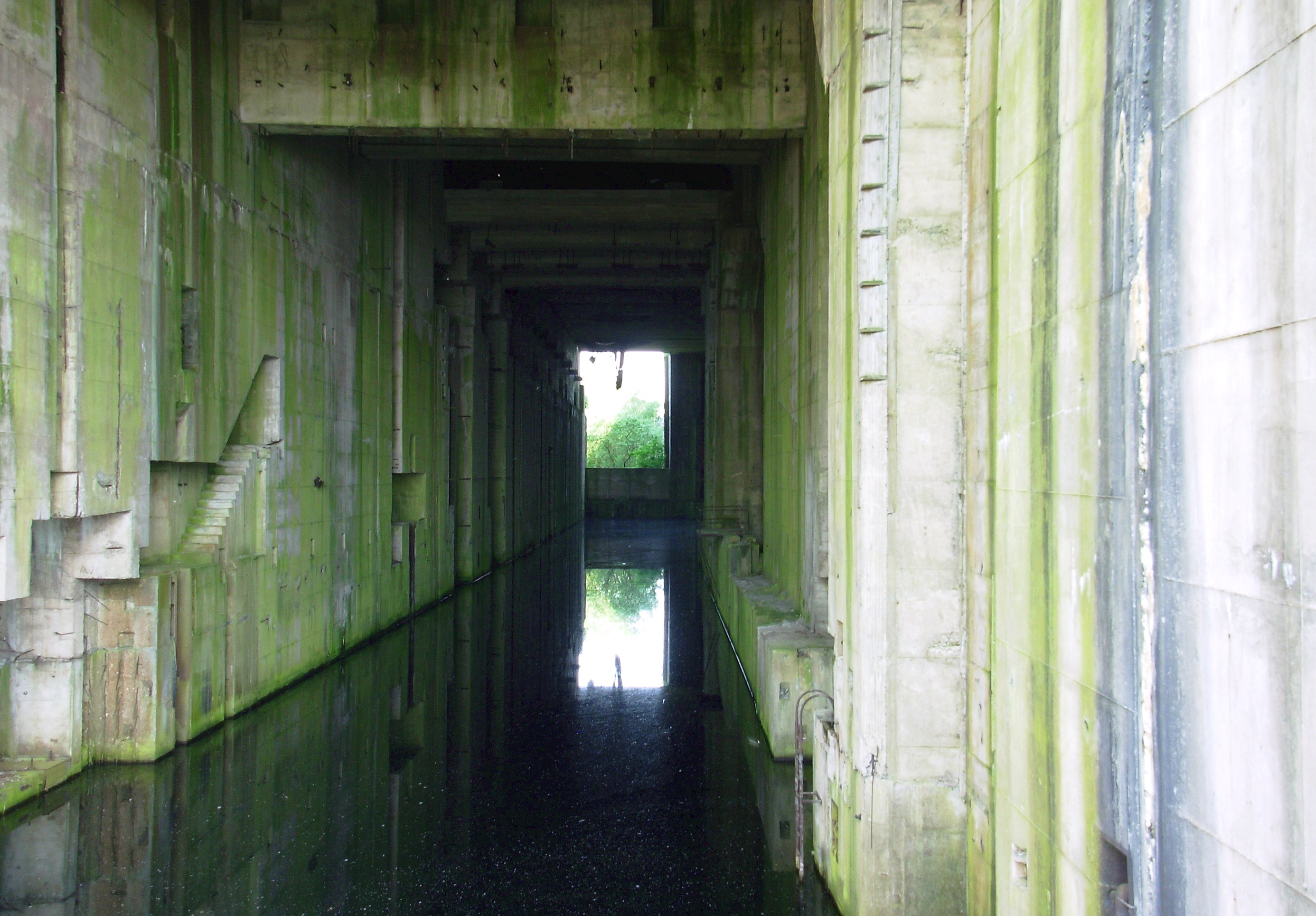 U-Bootbunker Valentin (Bremen) Innenansicht: Ausfahrt zur Weser Inside the Submarine Bunker Valentin (Bremen/Germany): Exit to Weser river